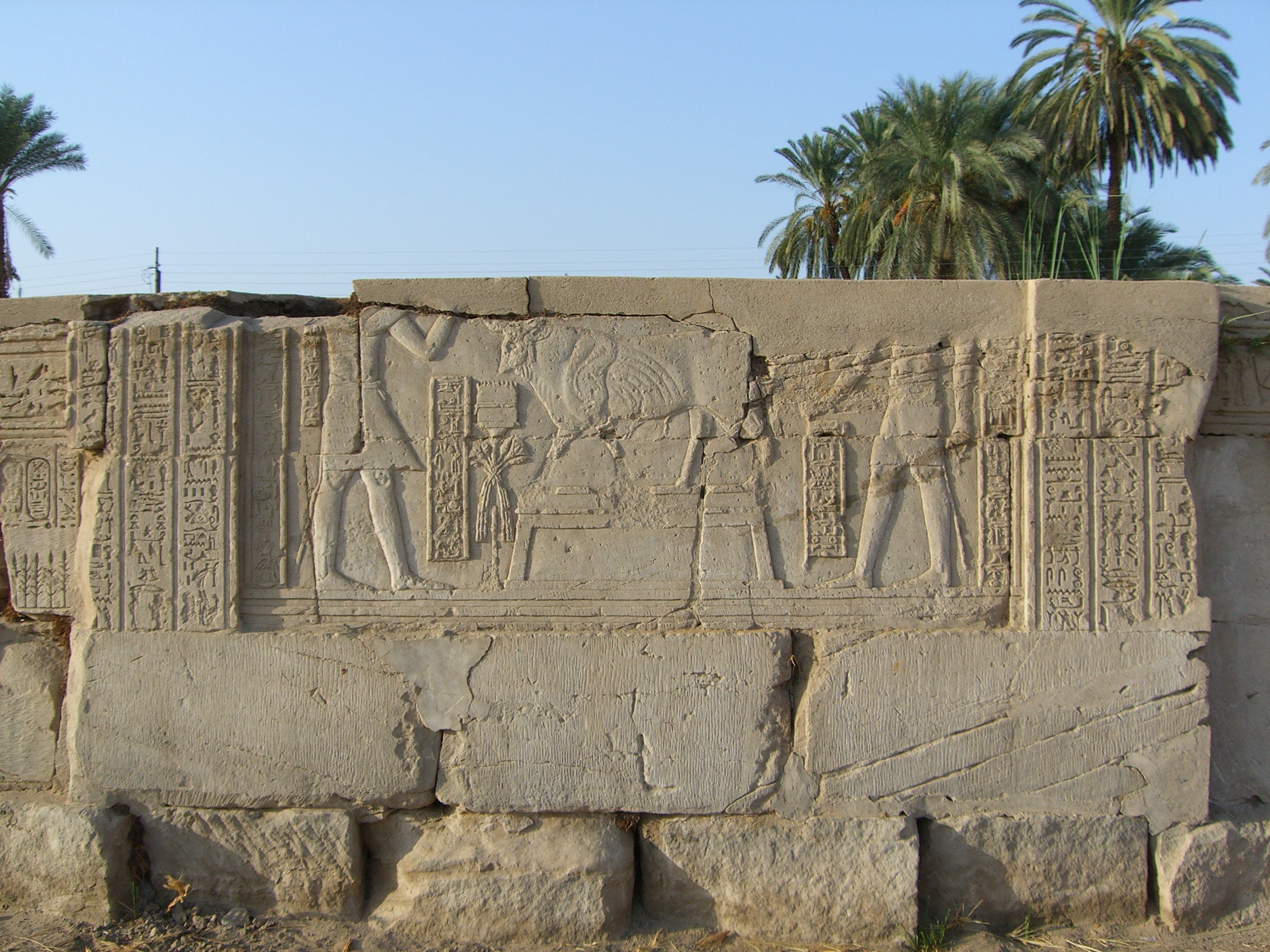 Relief représentant l'empereur Trajan faisant une offrande au taureau sacré Boukhis - Medamoud